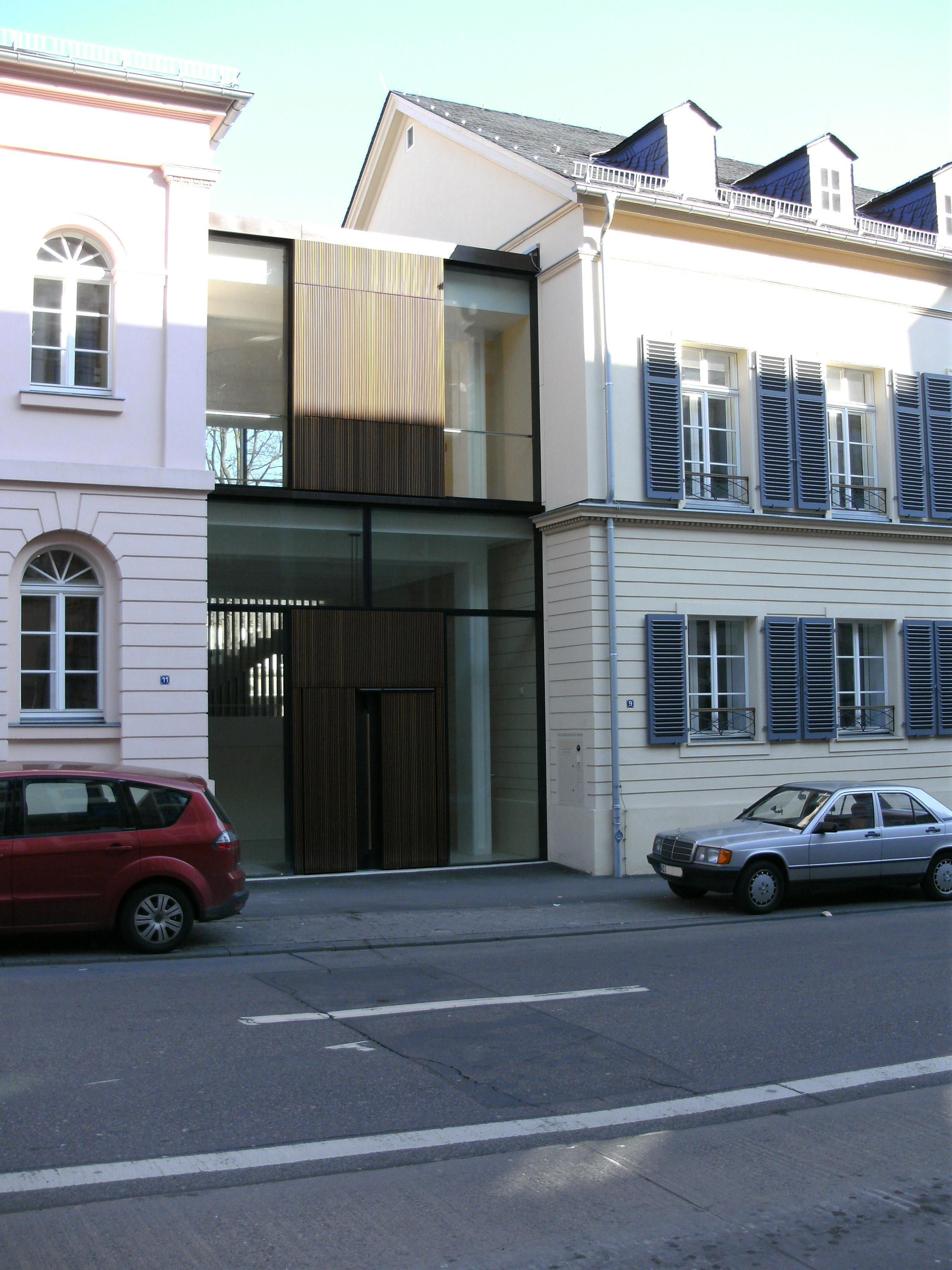 Hessischer Staatsgerichtshof, Luisenstraße, Wiesbaden